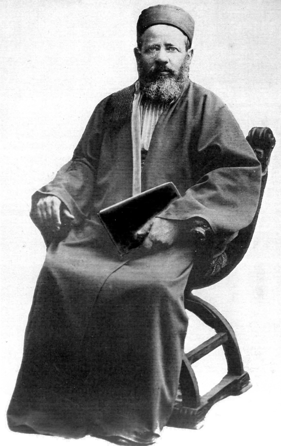 הרב מאיר שמואל קסטל